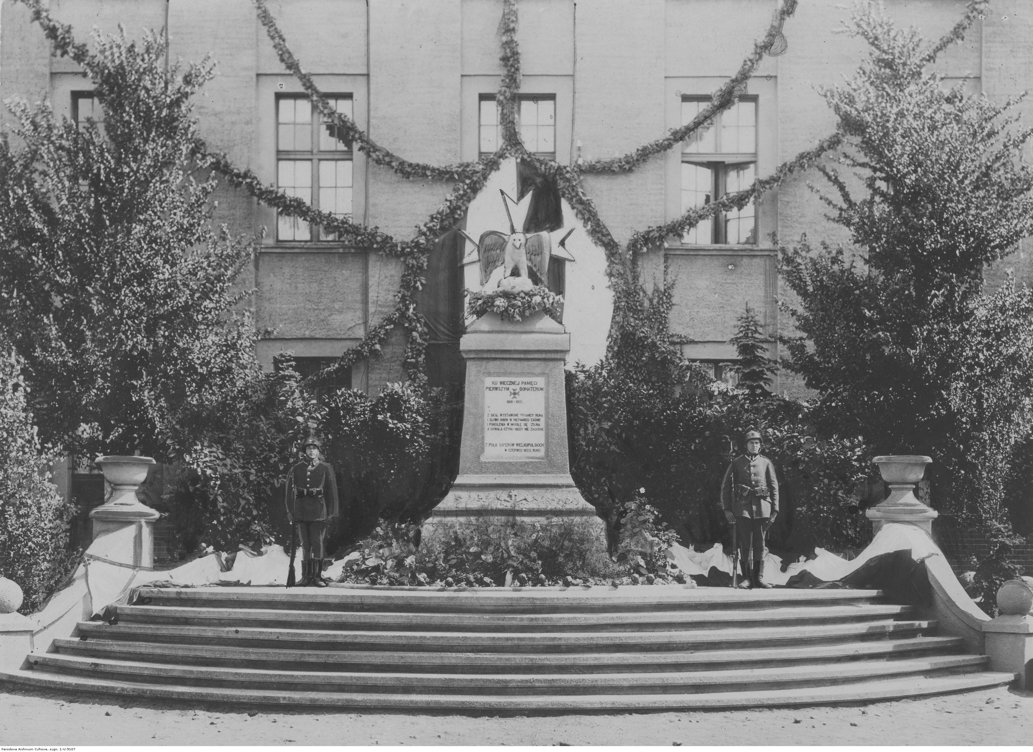 Poznań - pomnik ku czci poległych saperów wzniesiony przez 7 Pułk Saperów Wielkopolskich w 1923 r. Koncern Ilustrowany Kurier Codzienny - Archiwum Ilustracji. Sygnatura: 1-U-5107